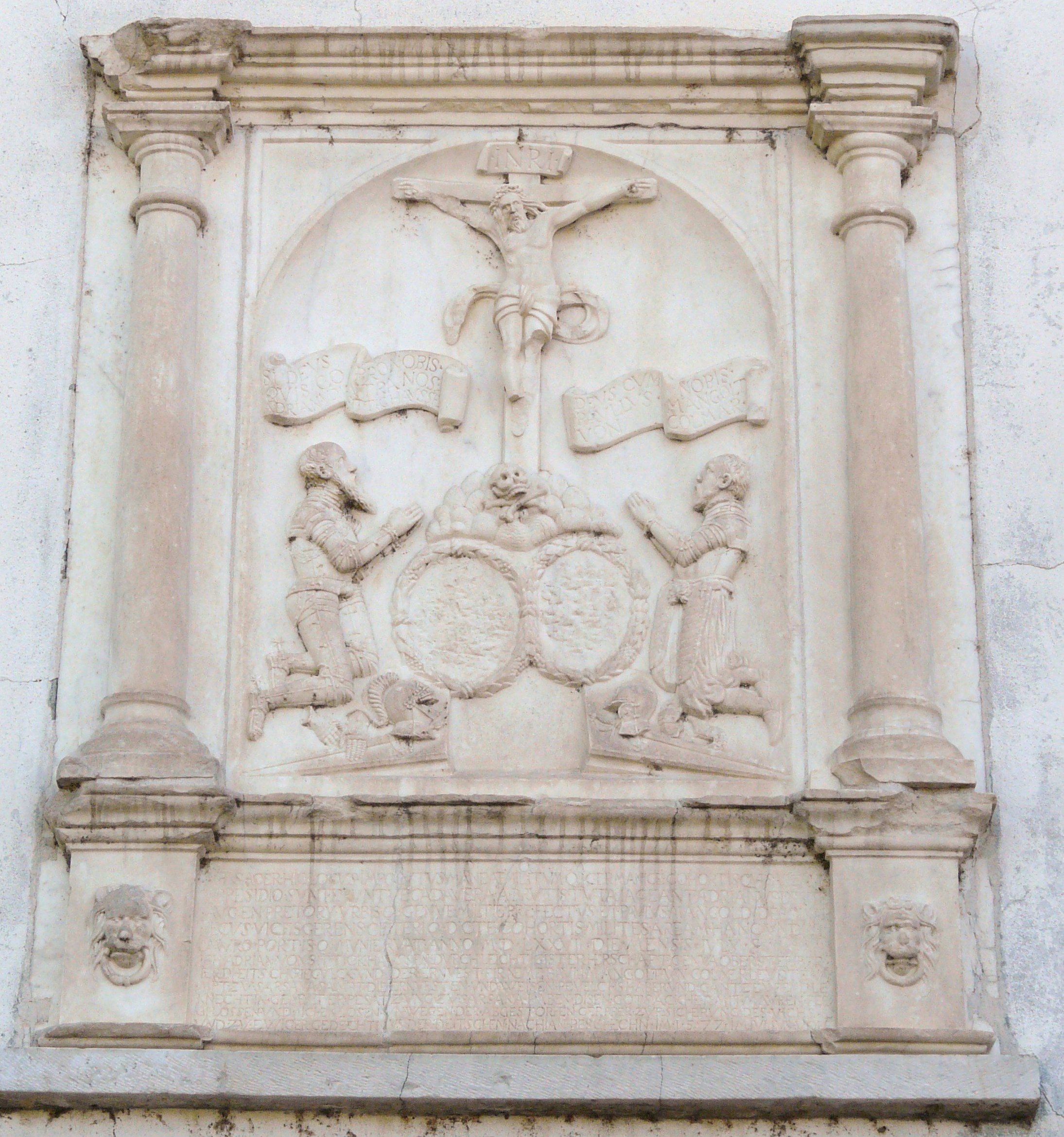 Chiesa, convento e chiostro di San Francesco, Sarzana, Liguria, Italia